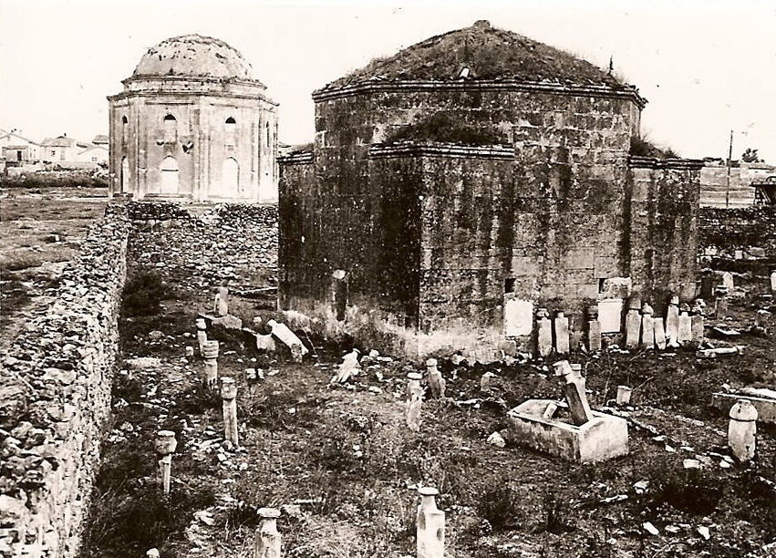 Дюрбе Ахмед-бея, сзади Дюрбе Мехмеда II Герая, начало 20 века. Автор неизвестен, находится в коллекции Мемориального музея Исмаила Гаспринского